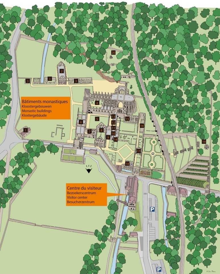 Plan de l'abbaye de Villers-la-Ville réalisé par Abbaye de Villers-la-Ville asbl et Yves Plateau